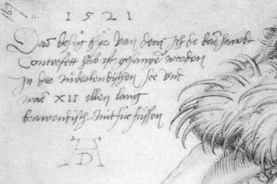 Kopf eines Walrosses, Text